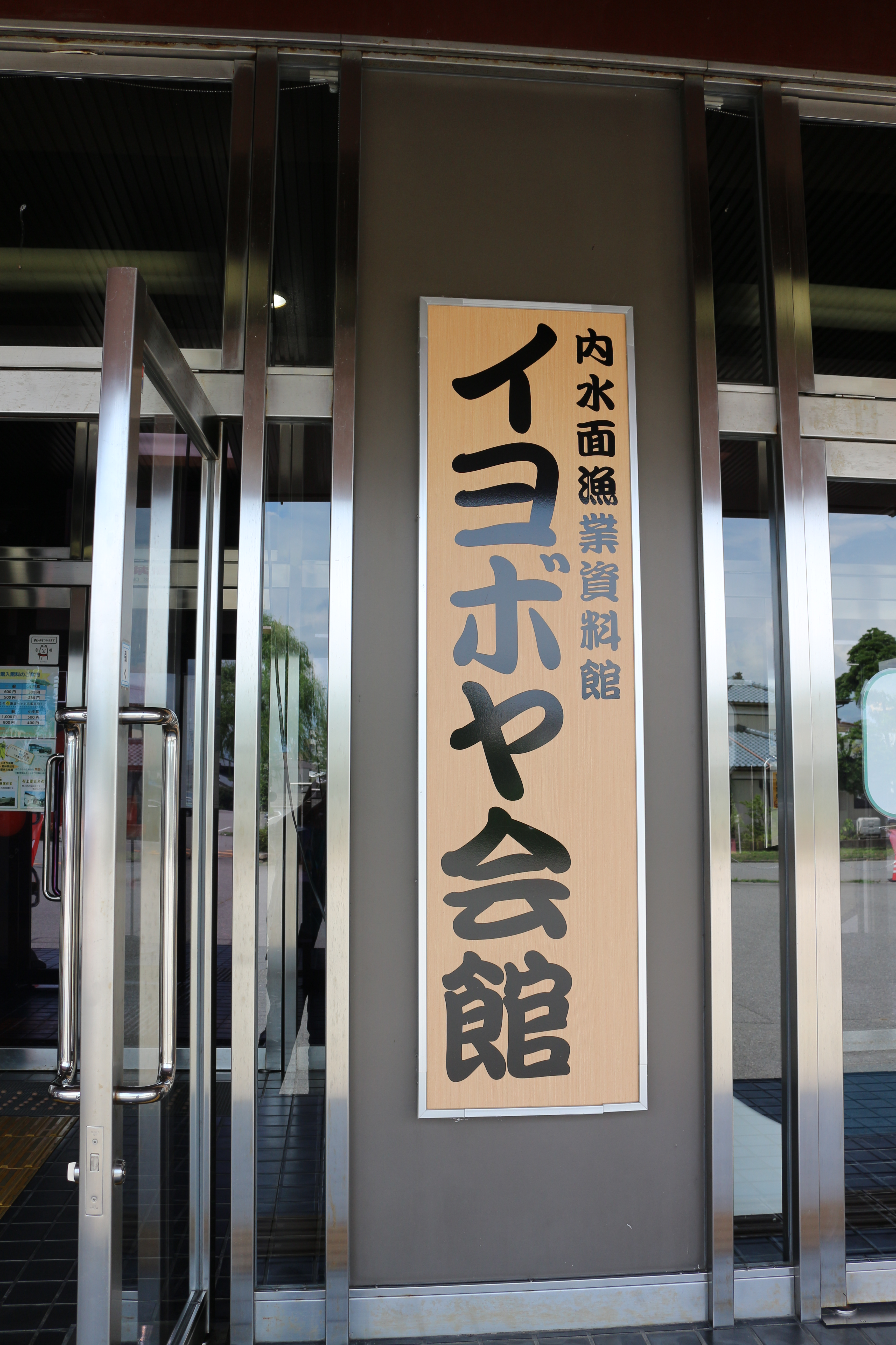 イヨボヤ会館（内水面漁業資料館）看板